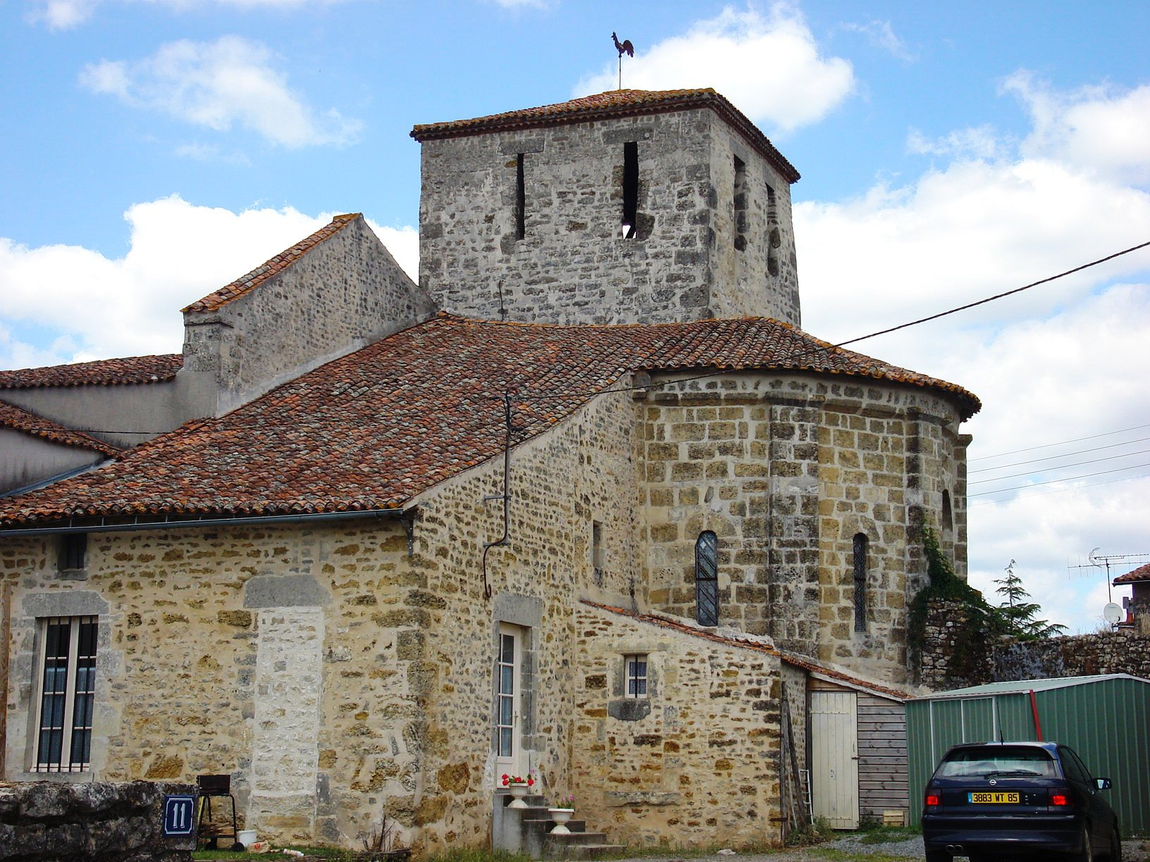 Église Saint-Hilaire de Cezais